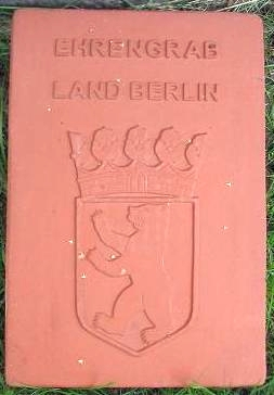 Markierungsstein Ehrengrab in Berlin